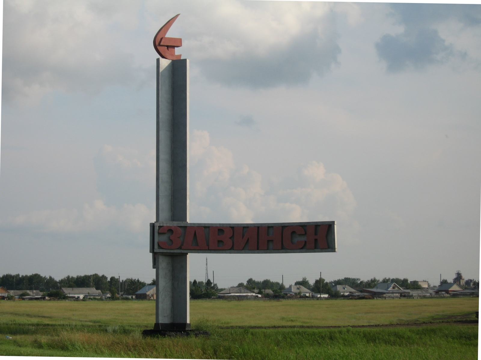 Въезд в Здвинск со стороны Барабинска